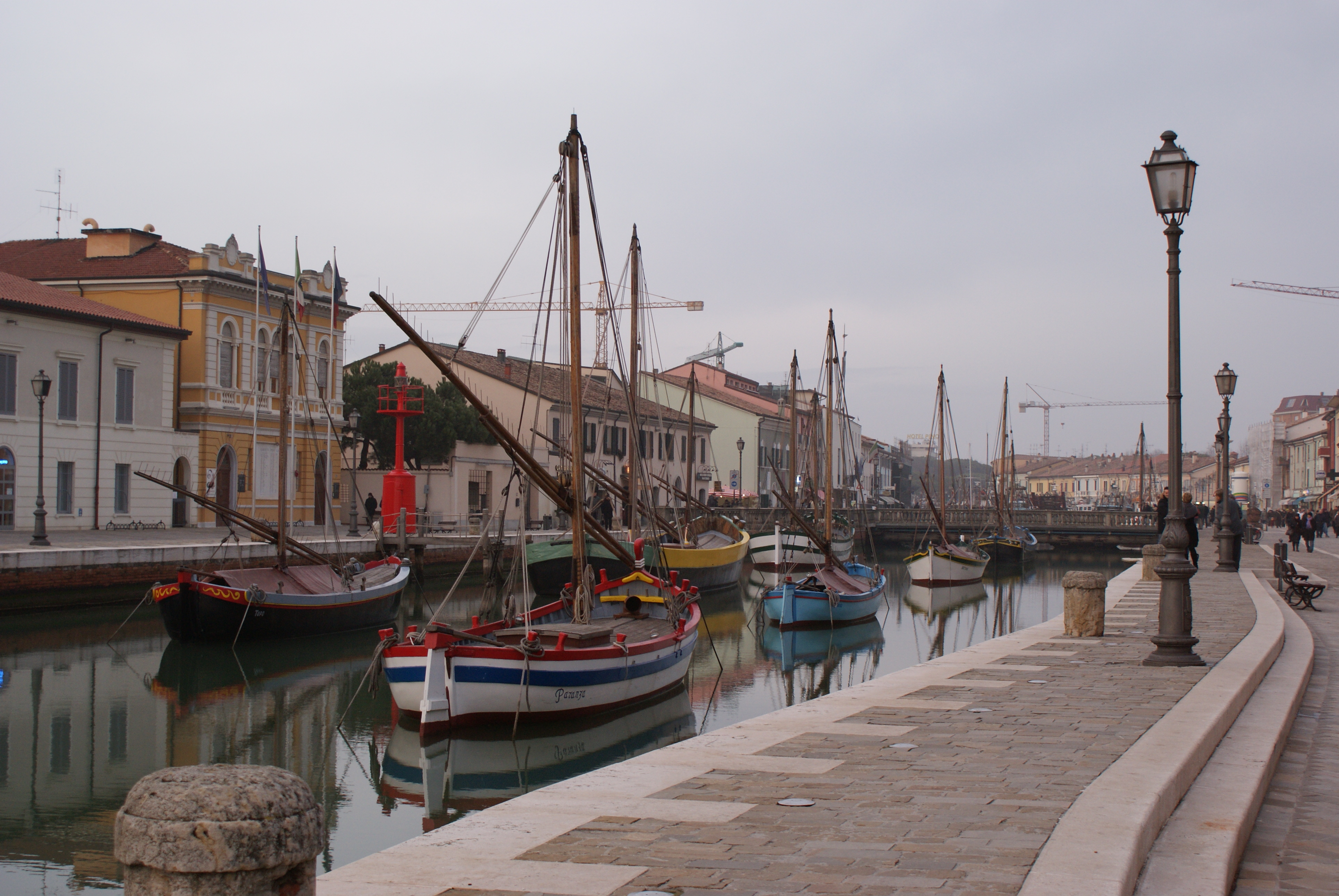 Porto Canale Leonardesco This is a photo of a monument which is part of cultural heritage of Italy.